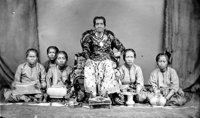 Negatief. Aru Pancana We Tenriolle, koningin van Tanette (Zuid-Sulawesi), met hofdames.